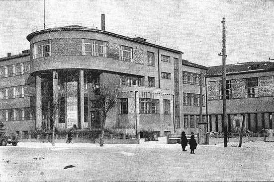 Беларуская (тарашкевіца): Менск (Miensk), рог вуліц Кашарскай (vulica Kašarskaja) і Ўнівэрсытэцкай (vulica Ŭniversyteckaja). Цэнтральная бібліятэка